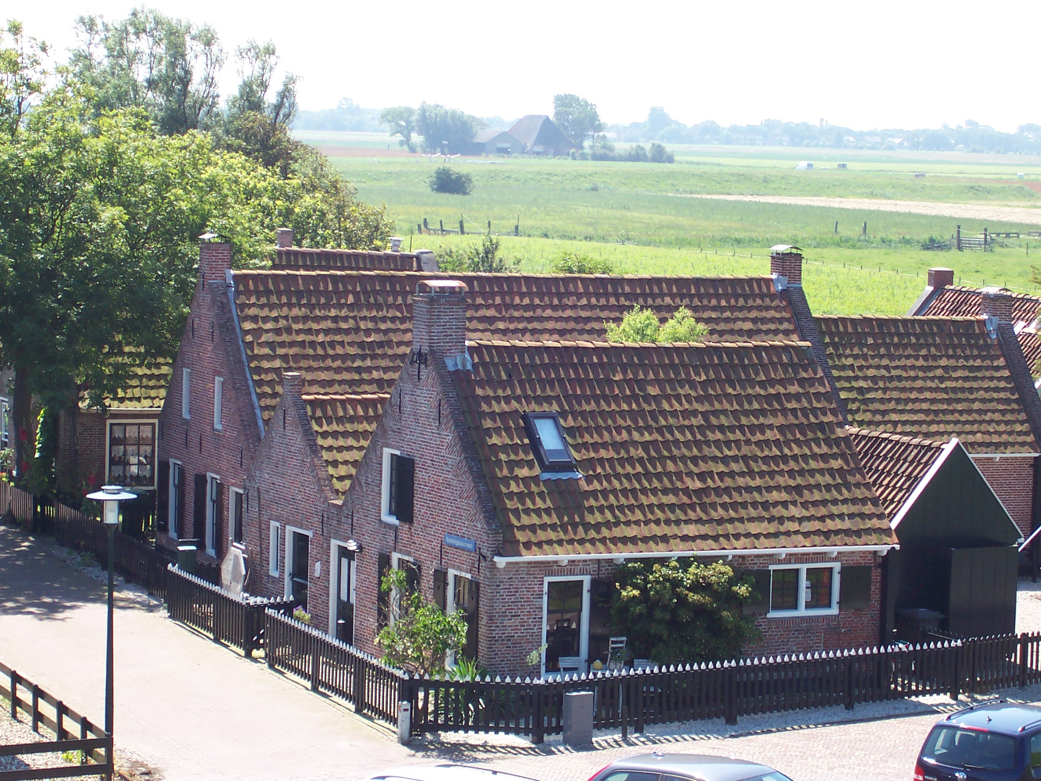 Blick vom Seedeich auf Moddergat